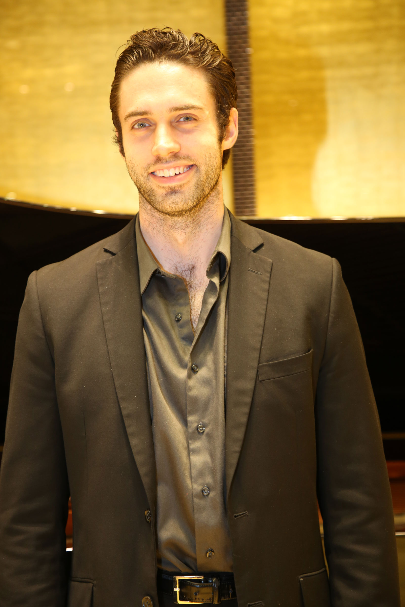 Tobias Greenhalgh, Bariton, dritter Preisträger beim 9. Internationalen Hilde Zadek Gesangswettbewerb